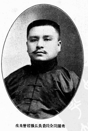 中文（台灣）: 張耀曾肖像